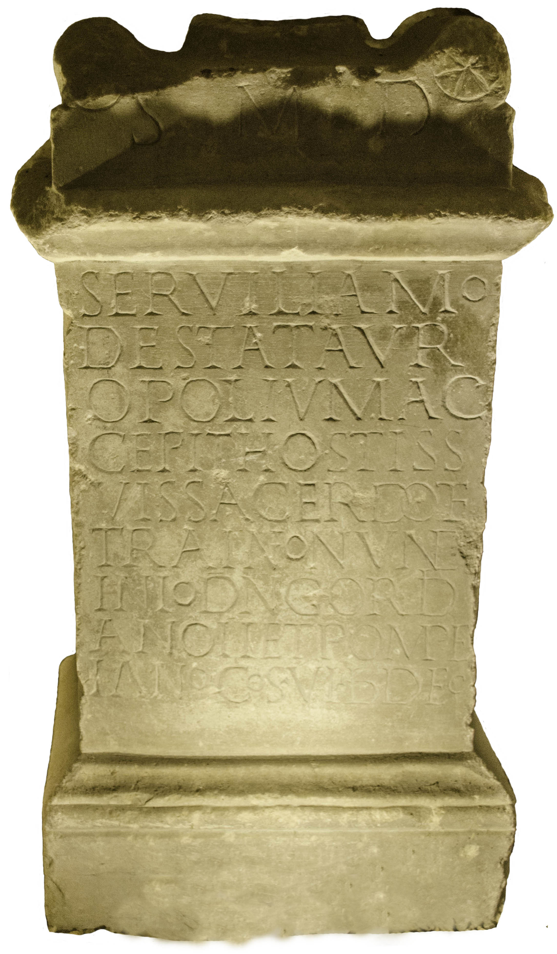 Autel taurobolique de Servilia Modesta. Musée Eugène-Camoreyt de Lectoure, Gers, France.